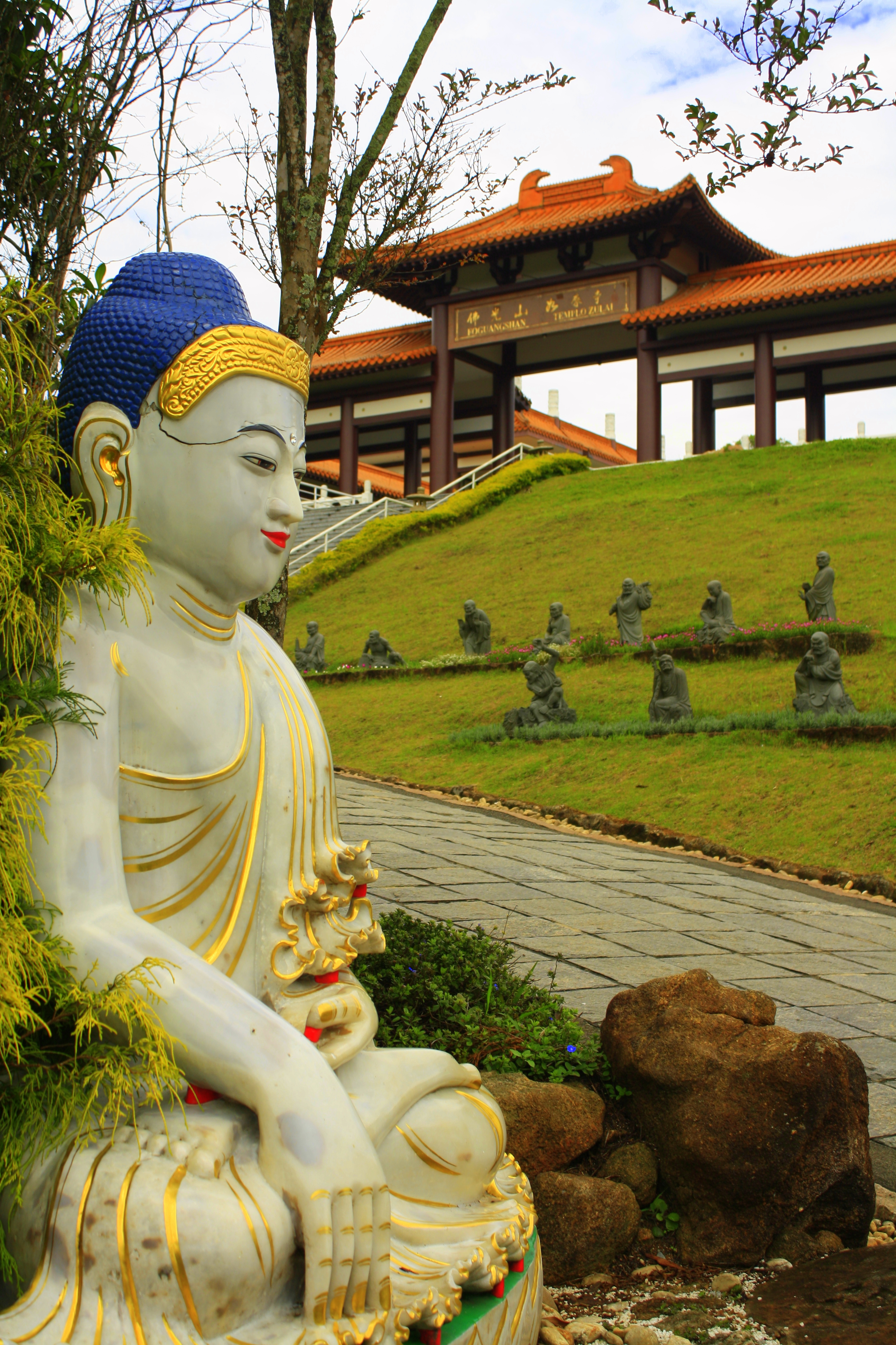 Templo Zu Lai em Cotia São Paulo Templo Zu